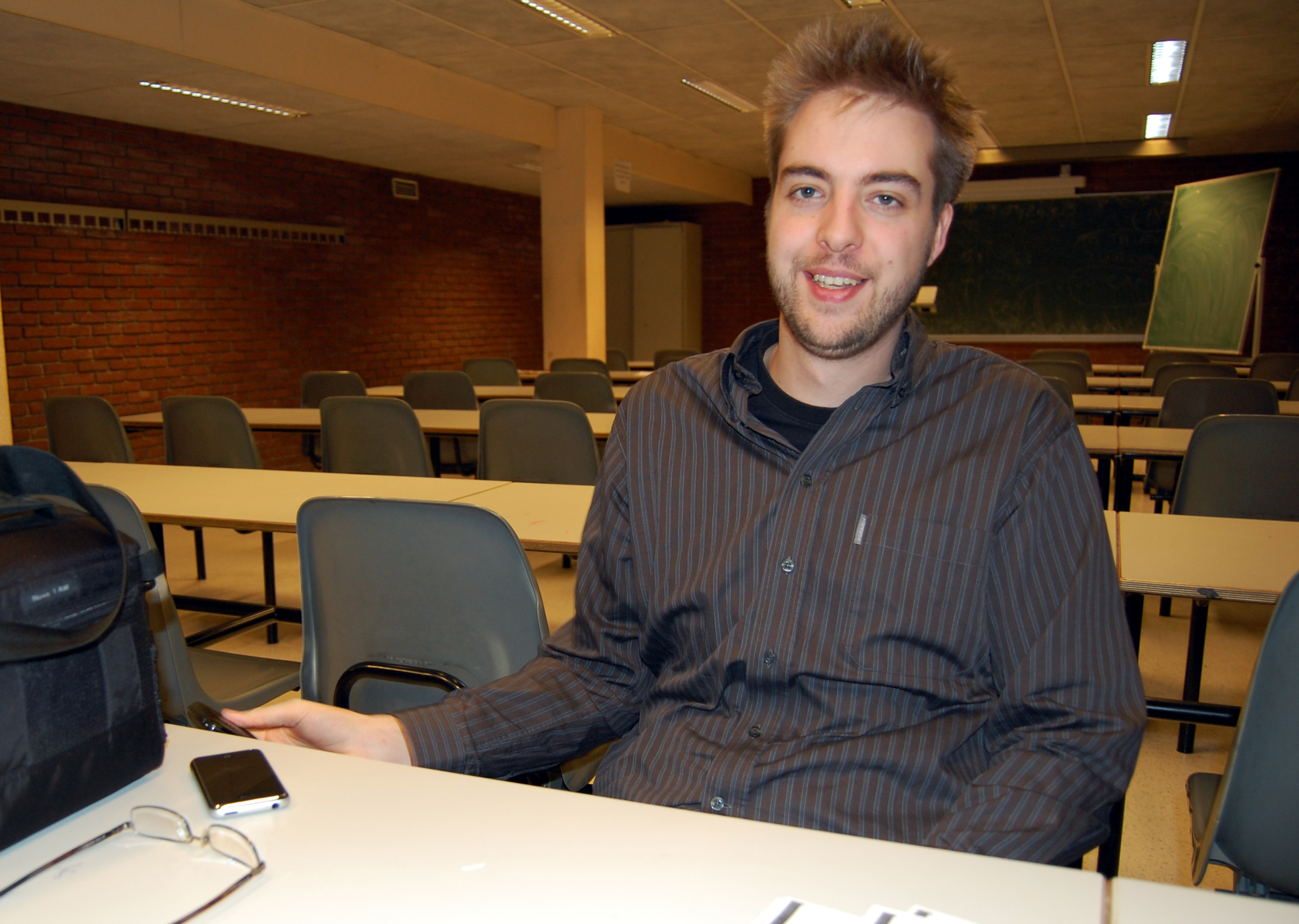 Dries Buytaert, Drupal founder, at FOSDEM 2008.